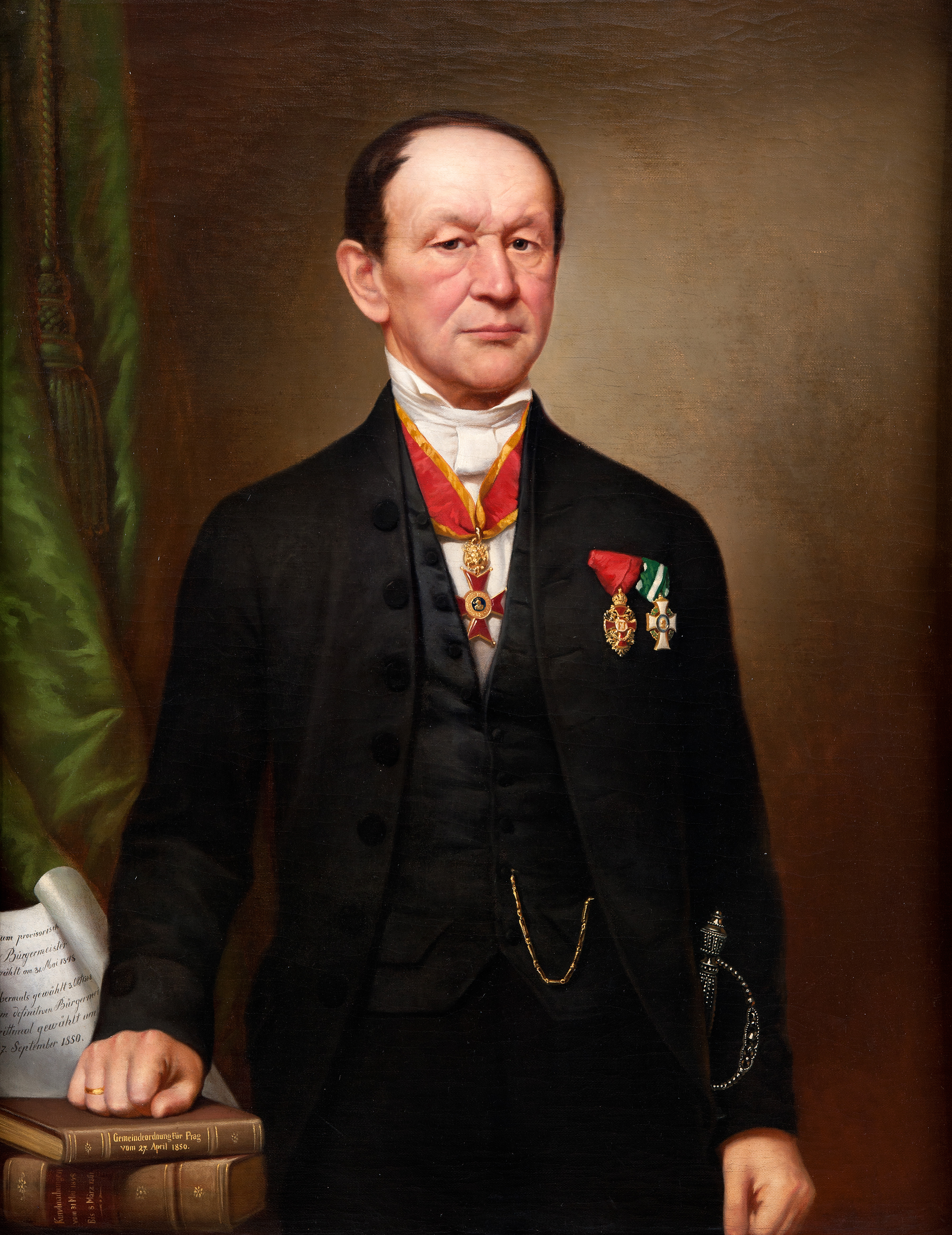 Václav Vaňka z Rodlova (1798 - 1872), Český advokát a politik.